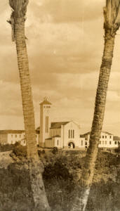 O seminário de Ipuarana em 1954